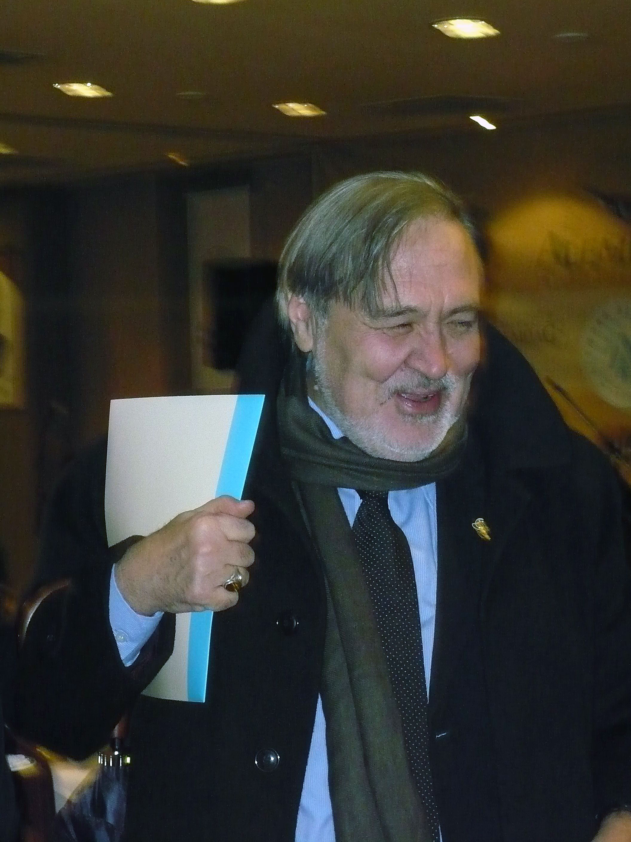 Prof.Dr. İlber Ortaylı